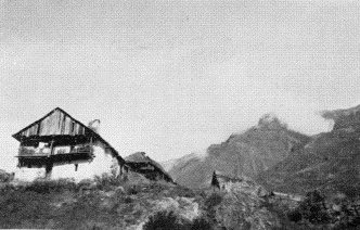 Maison de Félix-Neff à Dormillouse (Hautes-Alpes). Extraite d : S. LORTSCH , Félix Neff, l'Apôtre des Hautes-Alpes , Biographie extraite de ses Lettres, Nouvelle Société d’Editions de Toulouse, Dieulefit (Drôme), 1933.